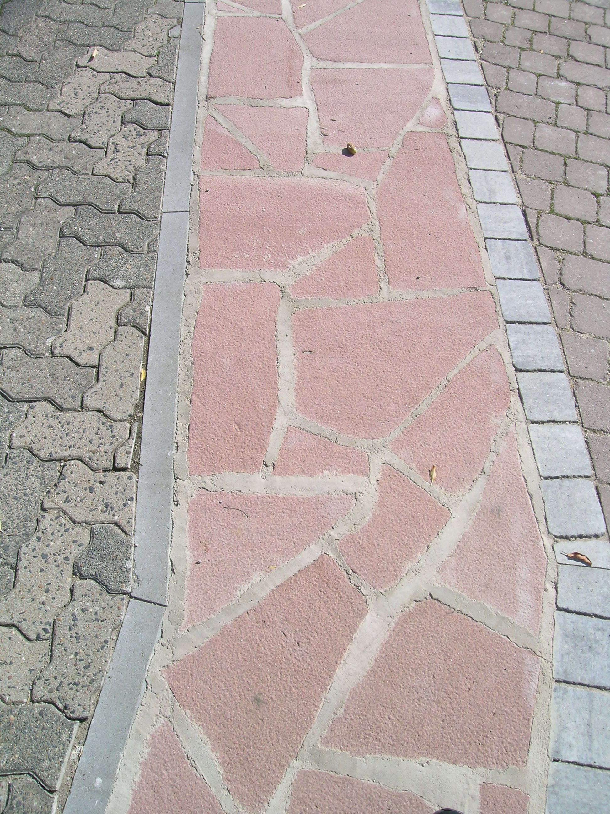 Kennzeichnung des Verlaufs der Ortsmauer auf dem Boden